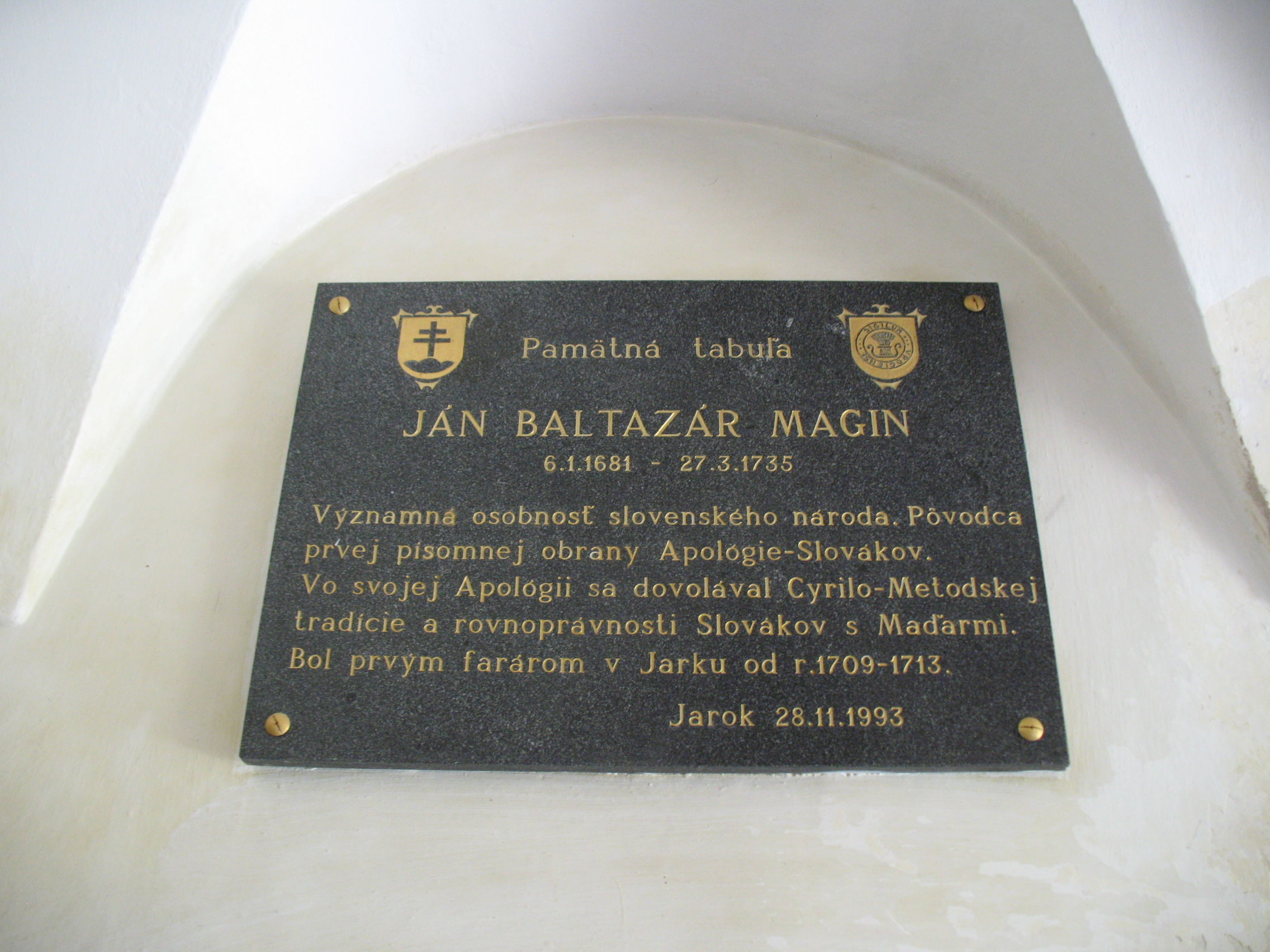 Üreg falu